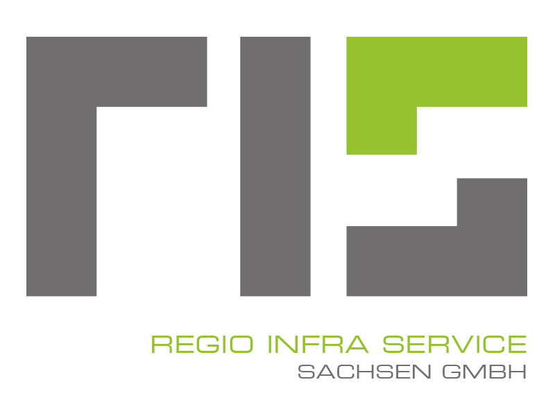 Logo von Regio Infra Service Sachsen GmbH